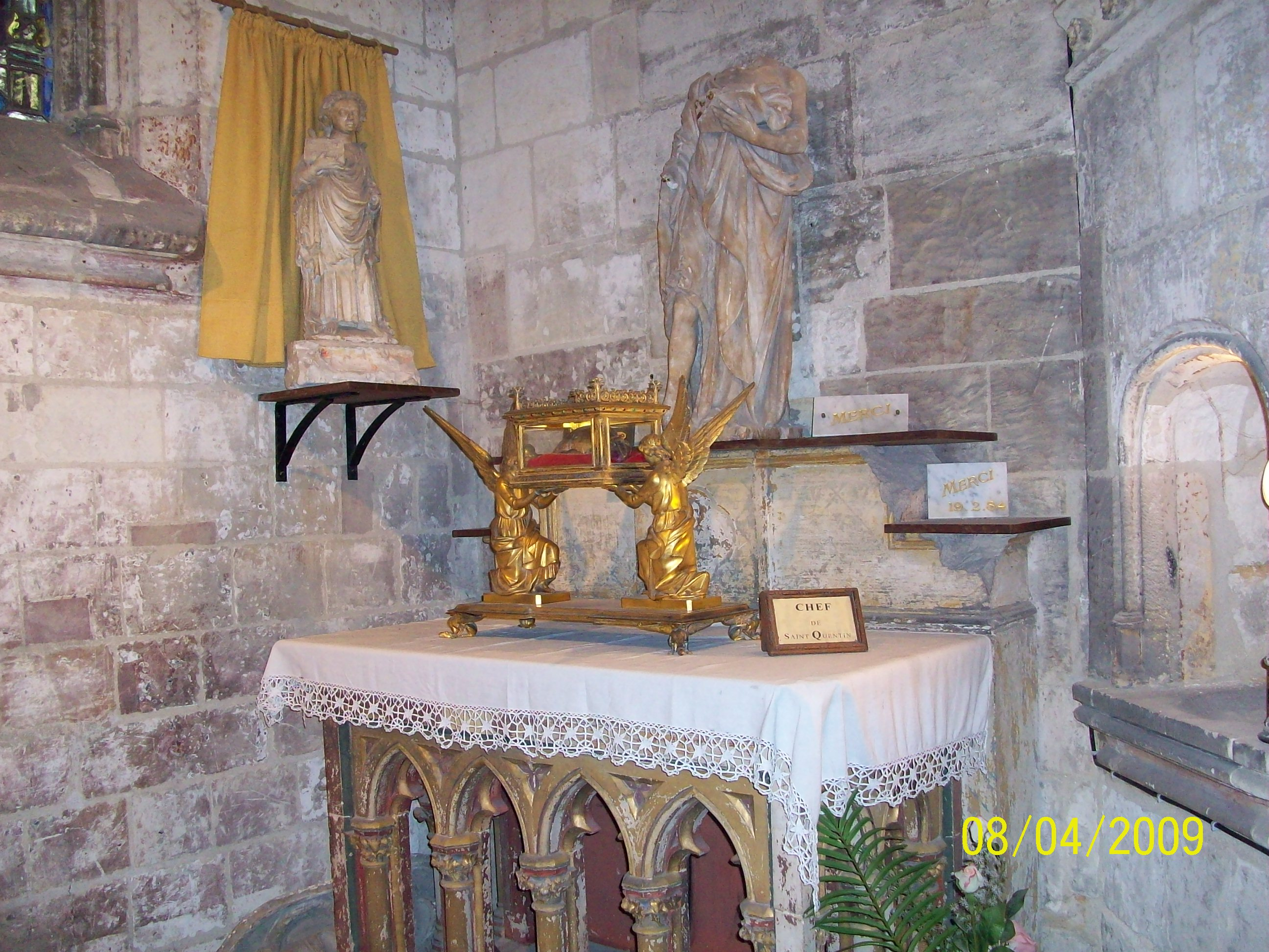 Relique du crane de saint Quentin à la basilique de Saint-Quentin 02100.